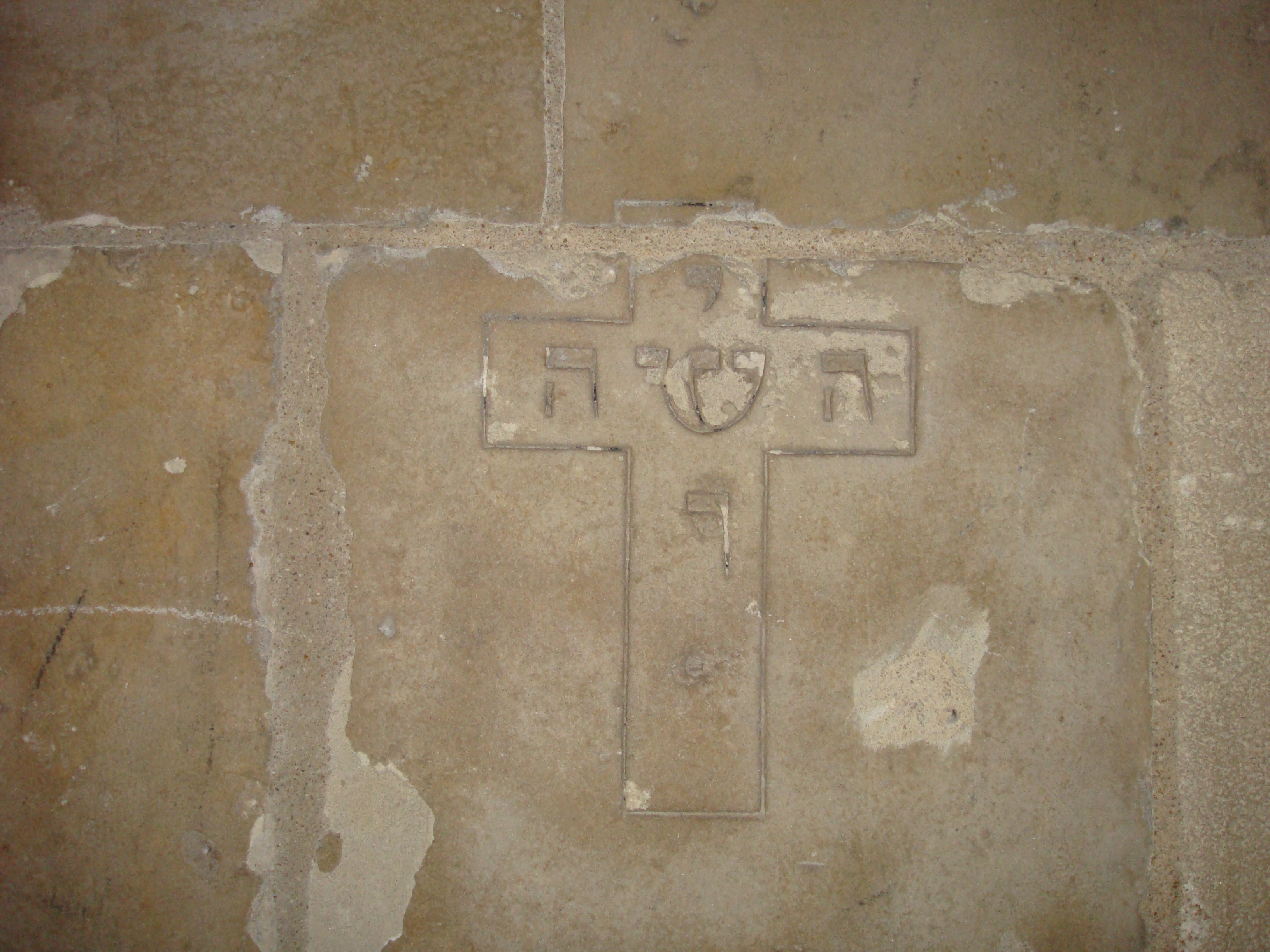 «L'agneau» gravé dans le mur l'ancienne chapelle de Saint-François Xavier.